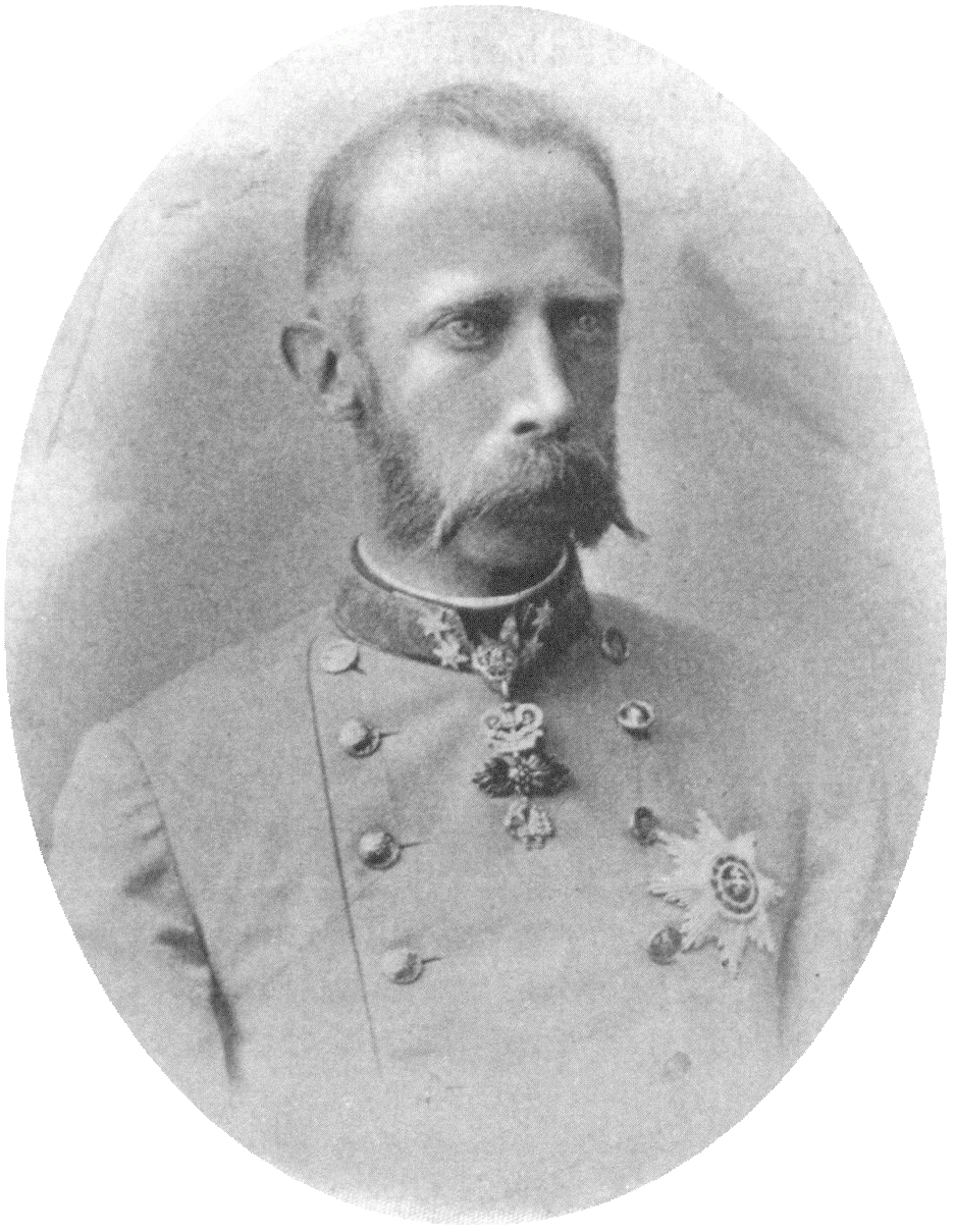 Archduke (Erzherzog) Ludwig Viktor of Austria (1842-1919), Austrian-Hungarian general